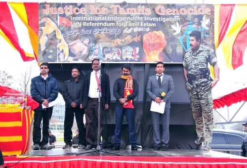 தமிழ் இன அழிப்பிற்கு நீதி கேட்டு சீமான் தலைமையில் ஜநா முன்றலில் திரண்ட மக்கள் வெள்ளம்!